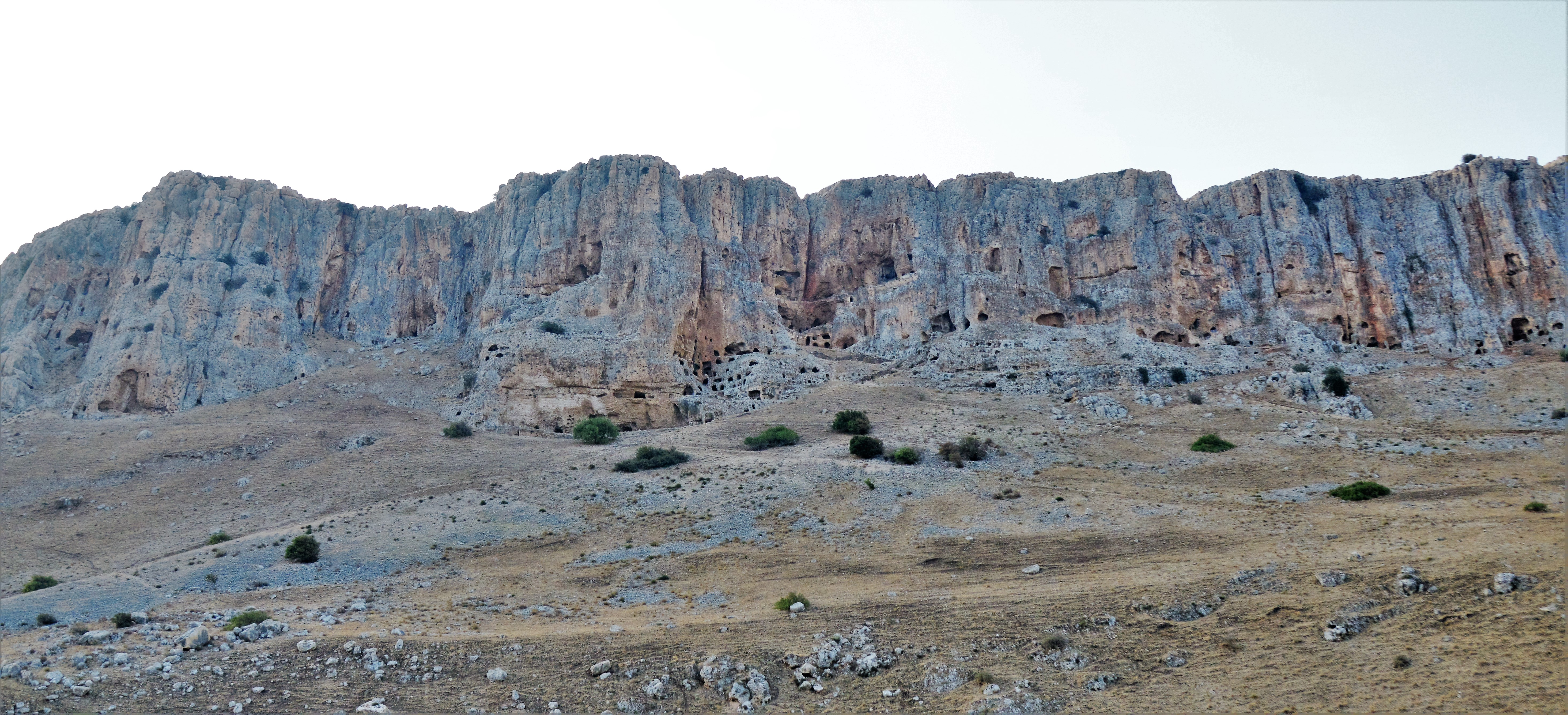 ארבל היה יישוב יהודי שהתקיים כבר בתקופה החשמונאית ושיאו היה בתקופה הרומית ובתקופה הביזנטית בימי המשנה והתלמוד. היישוב שכן בבקעת ארבל, באזור בו שוכן היום מושב ארבל. מהיישוב העתיק נשארו מספר שרידים שעיקרם הוא שרידי בית הכנסת הנמצאים מצפון למושב והוא חלק מגן לאומי ארבל.